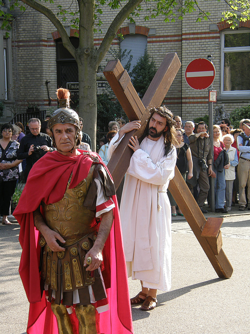 Bilder aus Stuttgart